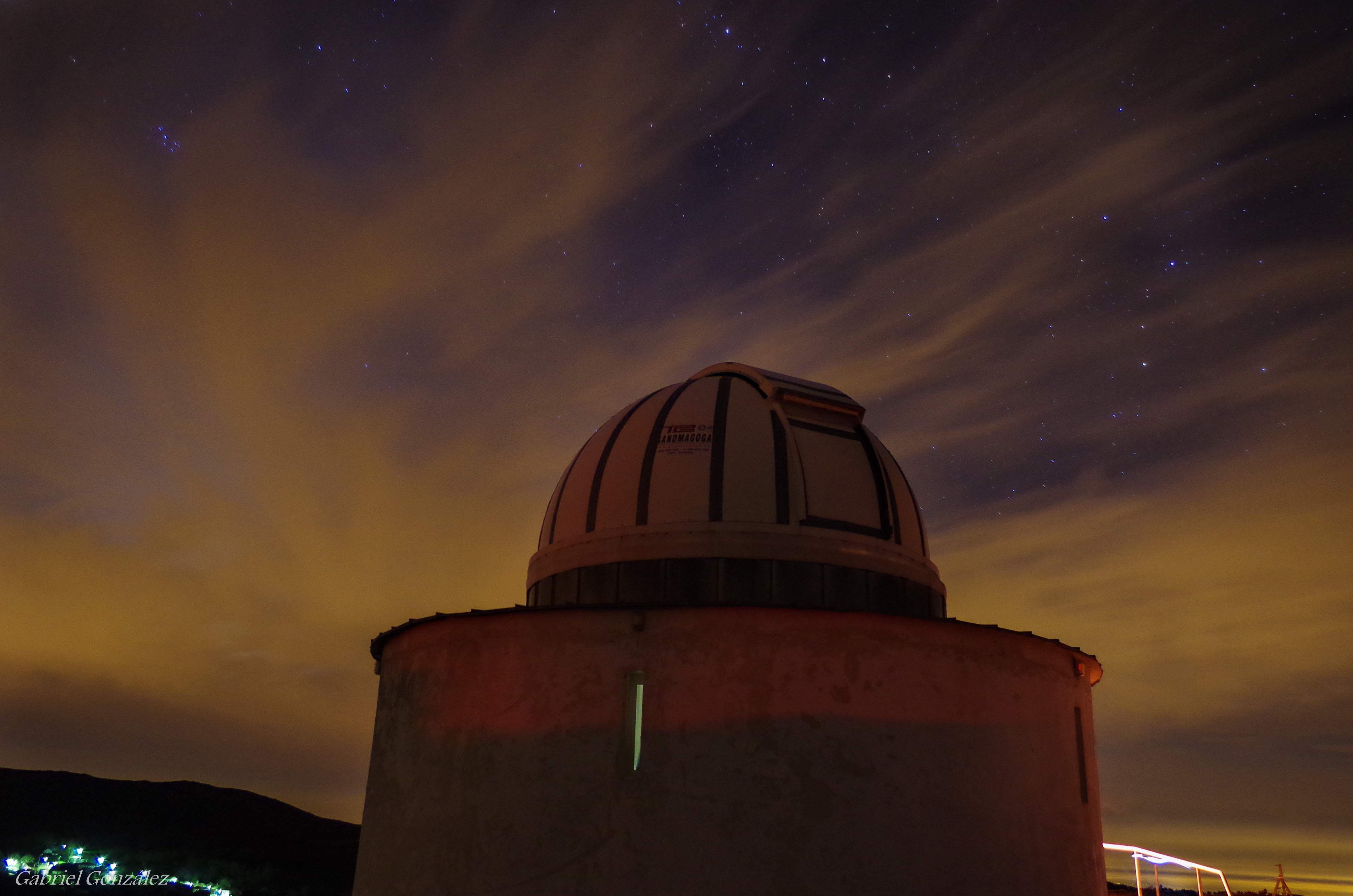 Observatorio Astronómico de Forcarei